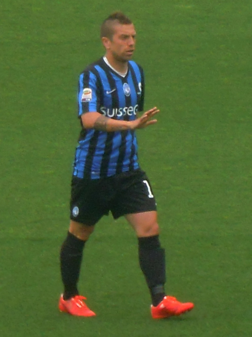 Alejandro Darío "Papu" Gomez, calciatore argentino, con la maglia dell'Atalanta